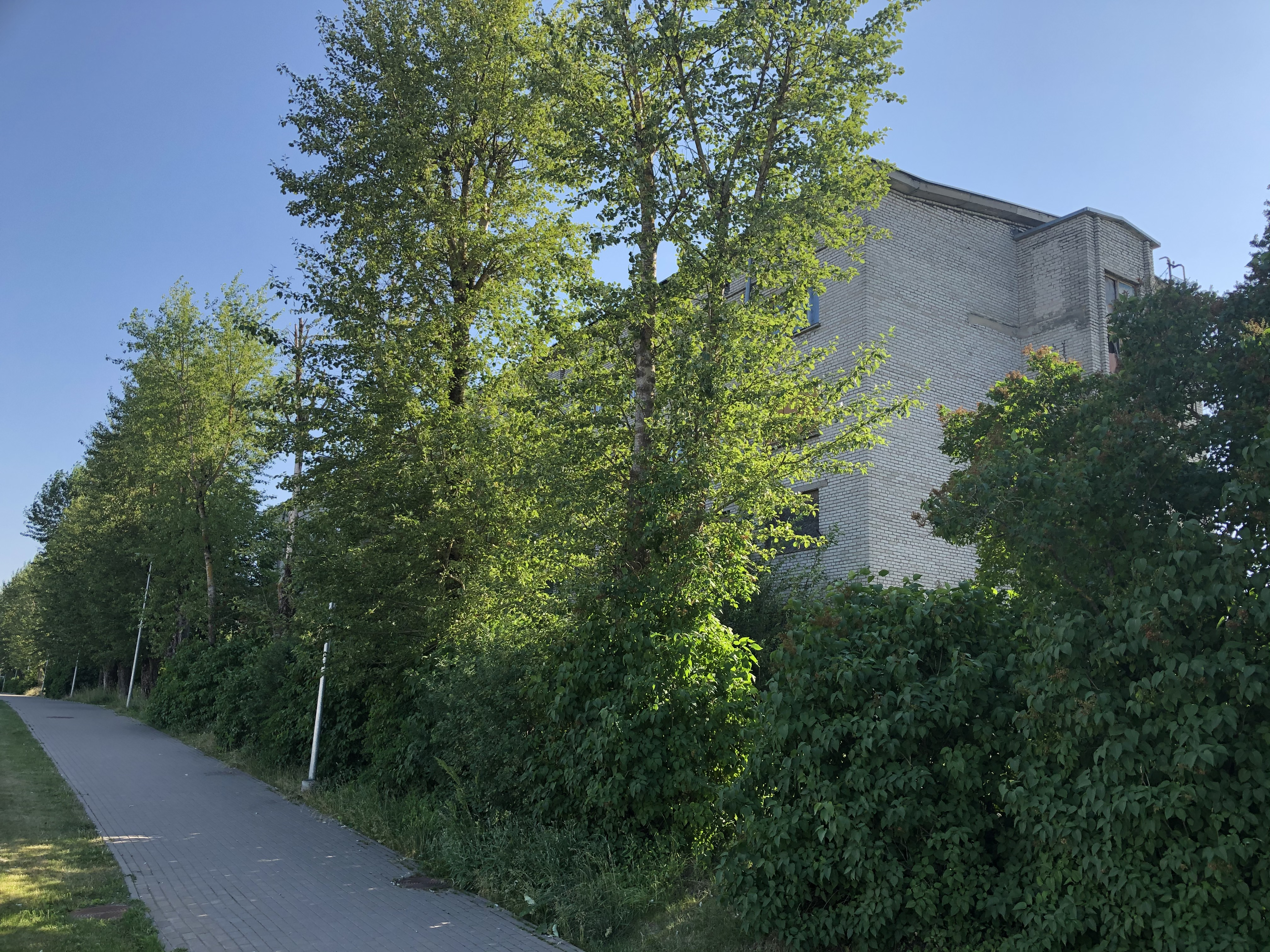 Endise Täiskasvanute kooli maja aadressil Puškini 31, Narva